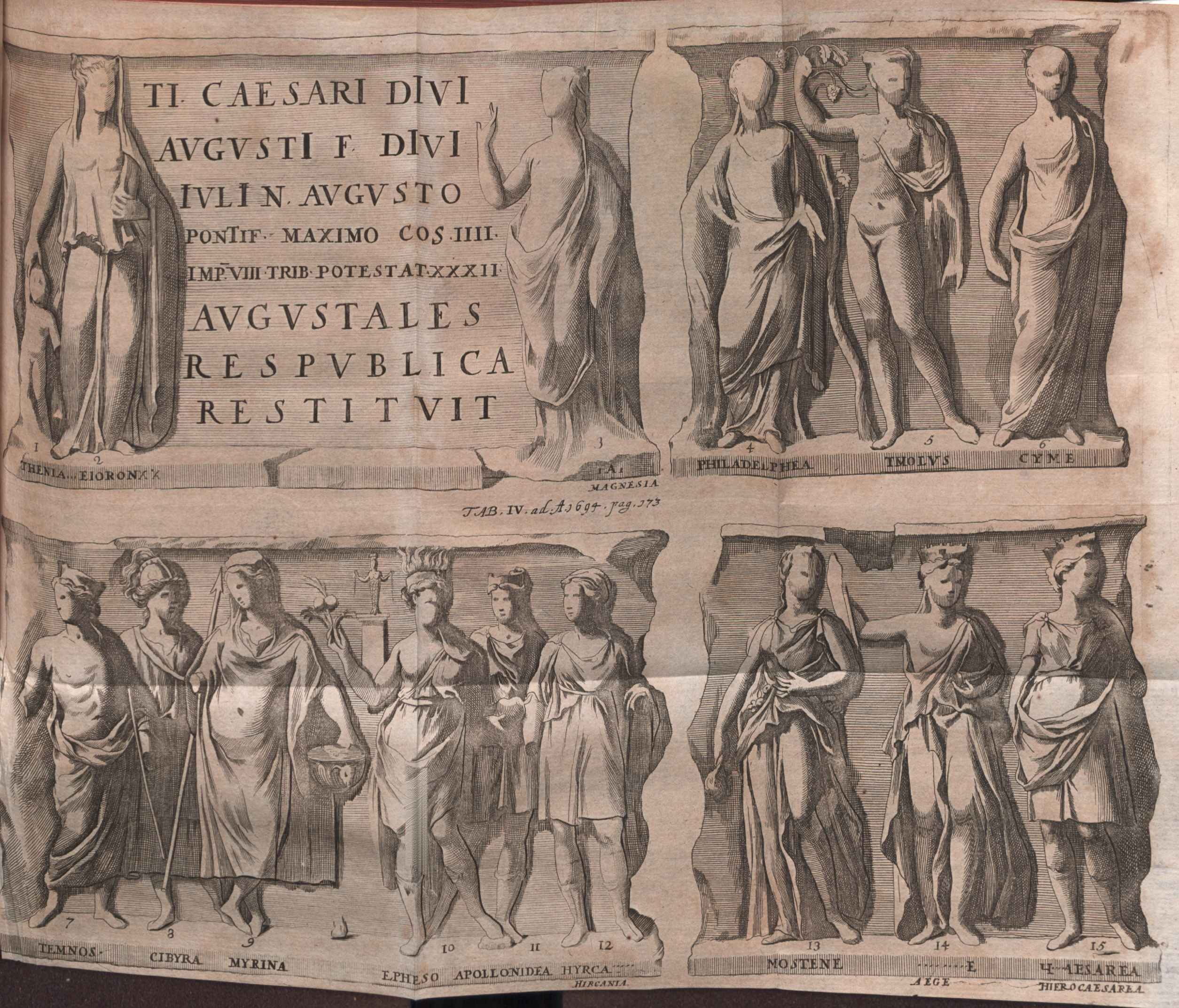 Illustration